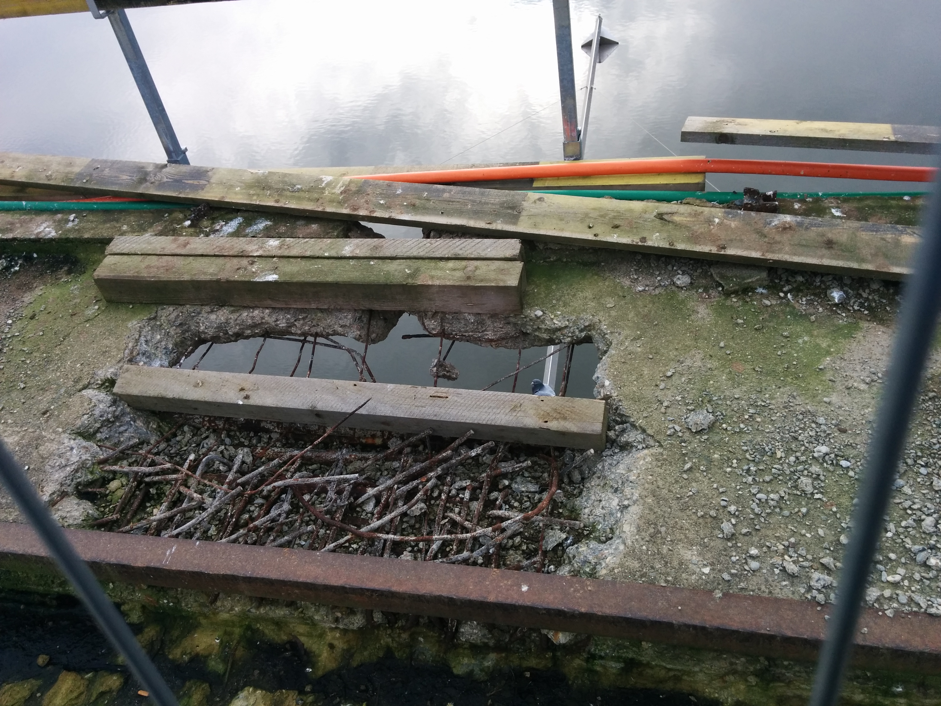 Tablier du pont de Godinne, au moment où il est fermé à la circulation. This photo of immovable heritage has been taken in the Walloon Region